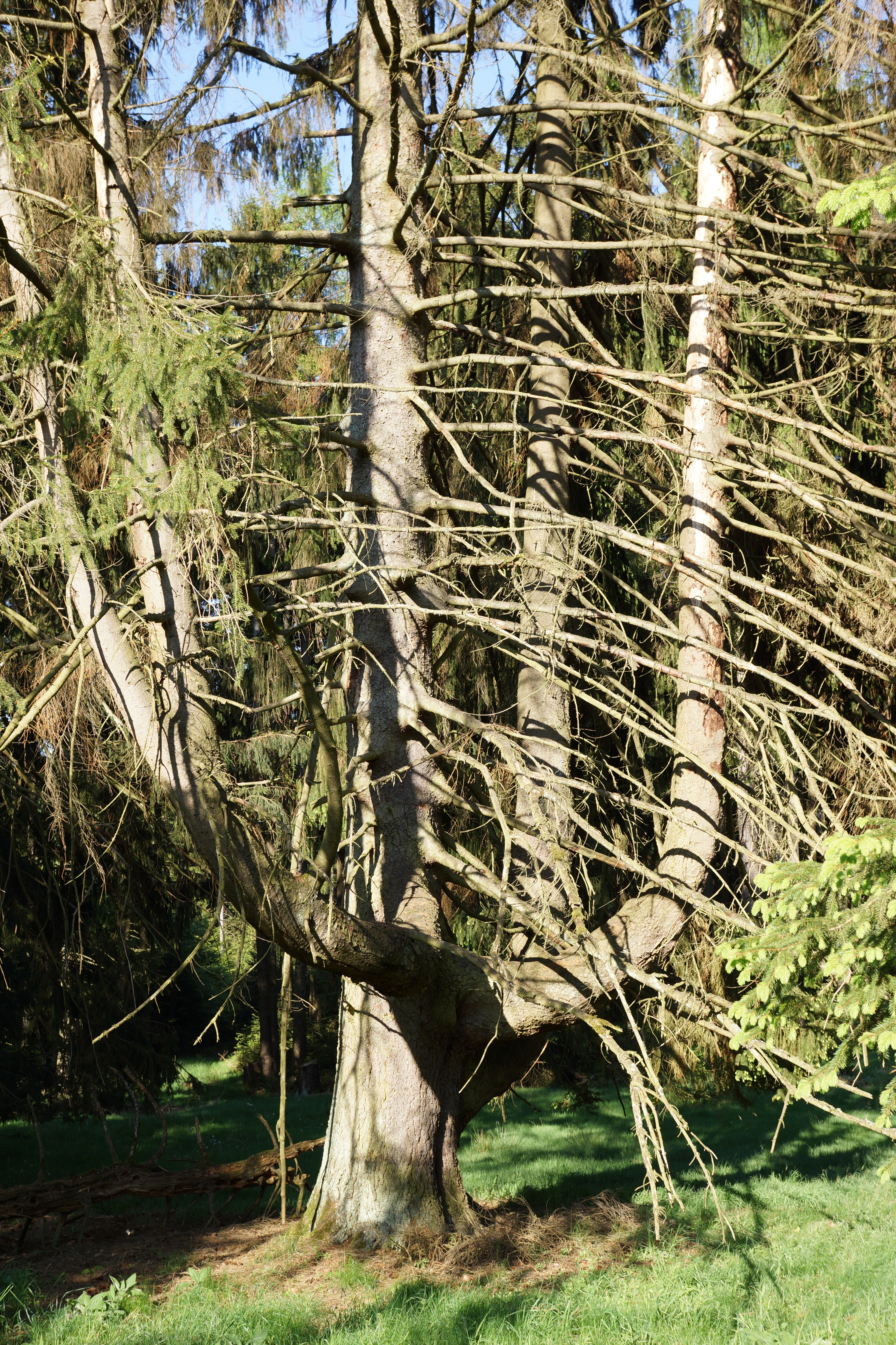 „Kandelaberfichte“ mit erhaltenem Leittrieb, eine mehrstämmige Fichte (Picea abies) im Naturschutzgebiet Gambach, Burbach, Nordrhein-Westfalen